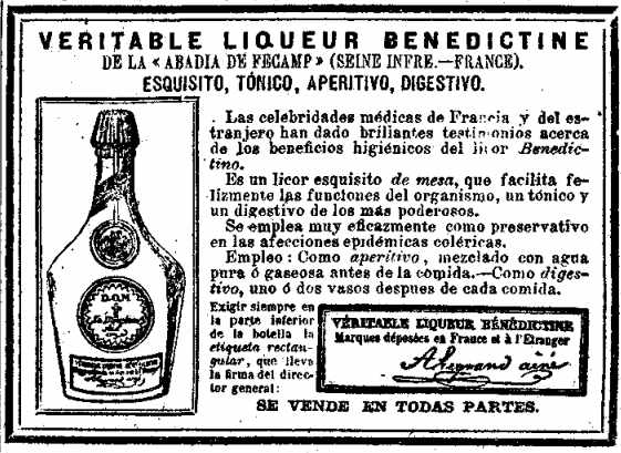 Veritable liqueur Benedictine